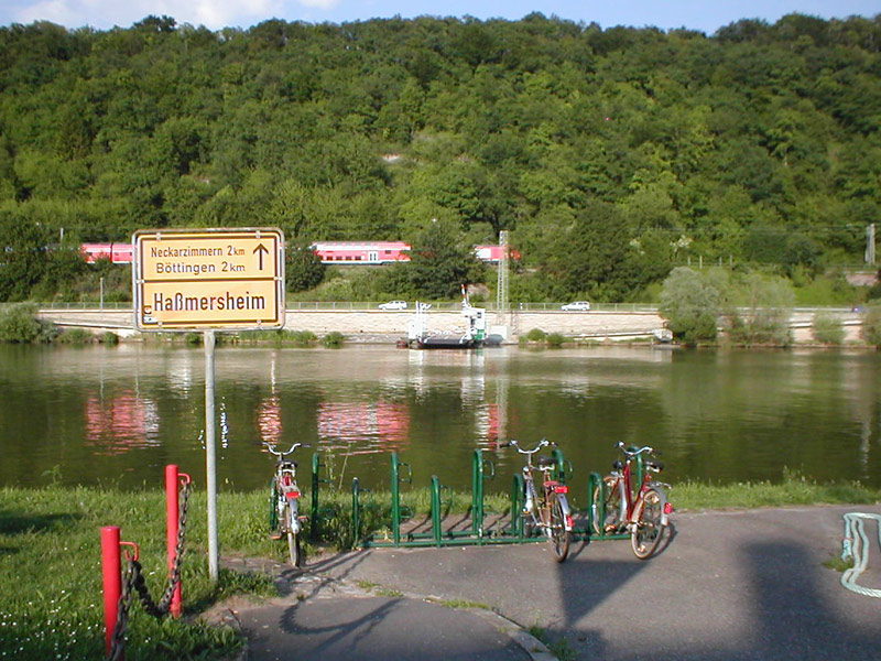 Blick von Haßmersheim am Neckar auf die am anderen Ufer liegende Kettenfähre und die dort verkehrende Neckartalbahn.